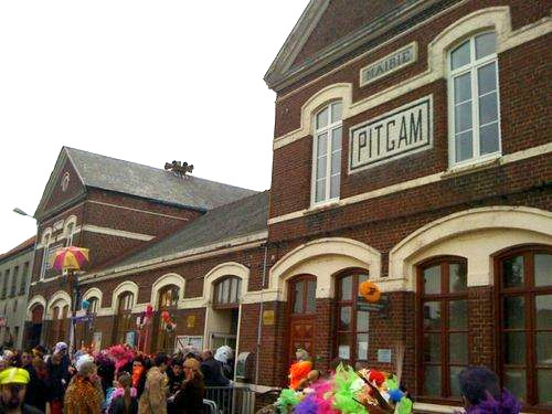 Mairie de Pitgam lors de la bande